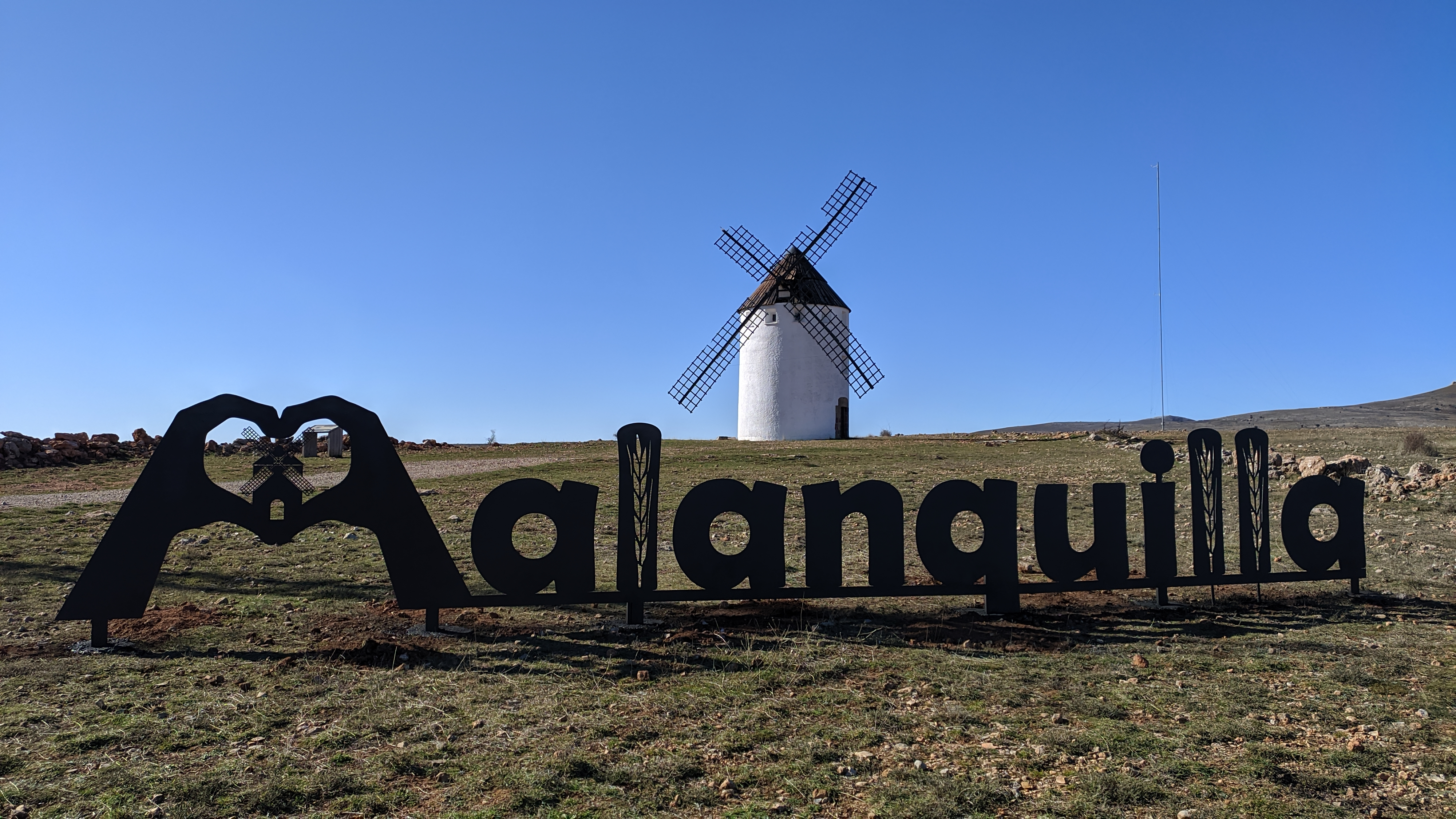 Logotipo instalado por el ayuntamiento en las cercanías del molino